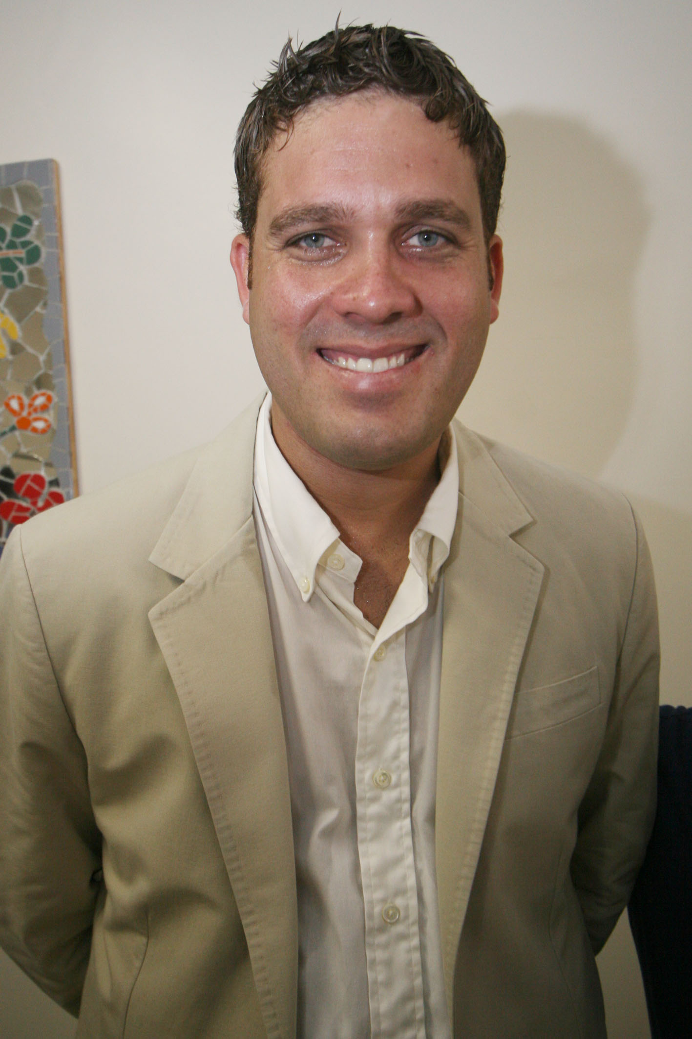 Marcelo de Oliveira Guimarães Filho, atual (2011) presidente do Esporte Clube Bahia e ex-deputado federal do Brasil pela Bahia.